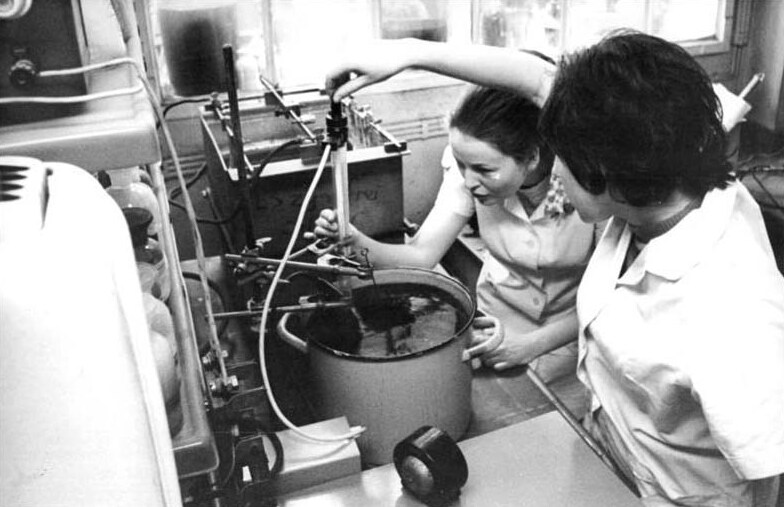 Forschung zum Umweltschutz ADN-ZB Kluge 14.3.73 Leipzig:Vorbereitung X.-An der Entwicklung eines Netzmittels für ein giftfreies gavanisches Verfahren zum Glanz-Verzinken arbeiten Chemie-Ingenieur Renate Rittig(l.) und Chemotechnikerin Martina Runge.Durch die Anwendung dieses neuen Verfahrens werden sich die Arbeitsbedingungen in den Betrieben der galvano-technischen Industrie der DDR verbessern.Außerdem wird dadurch den Bestimmungen den Umweltschutzes besser entsprochen, denn das zur Zeit angewendete Verfahren führt zur Verschmutzung der Abwässer.Die Entwicklung dieses Netzmittels ist eines der zehn Jugendobjekte, an denen die Jugendlichen des VEB Galvanotechnik gegenwärtig arbeiten.